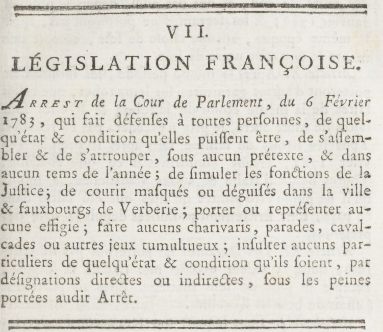 Interdictions diverses à Verberie.